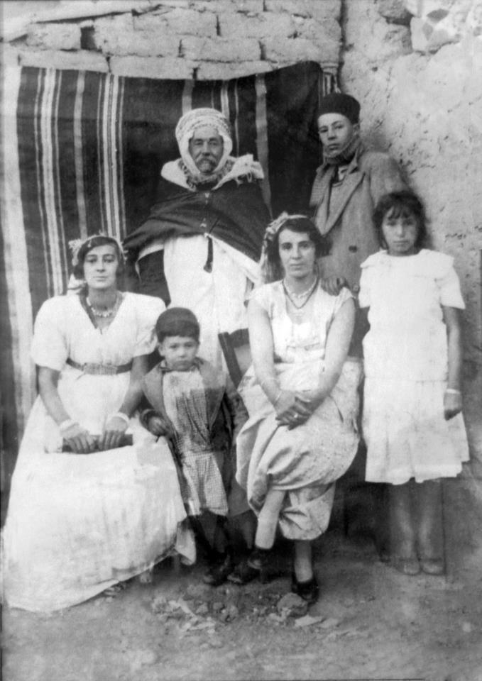 La Famille de Kateb Yacine dans les années 40, Kateb dans la photo est l'enfant le tout petit (Entre ses deux sœurs)